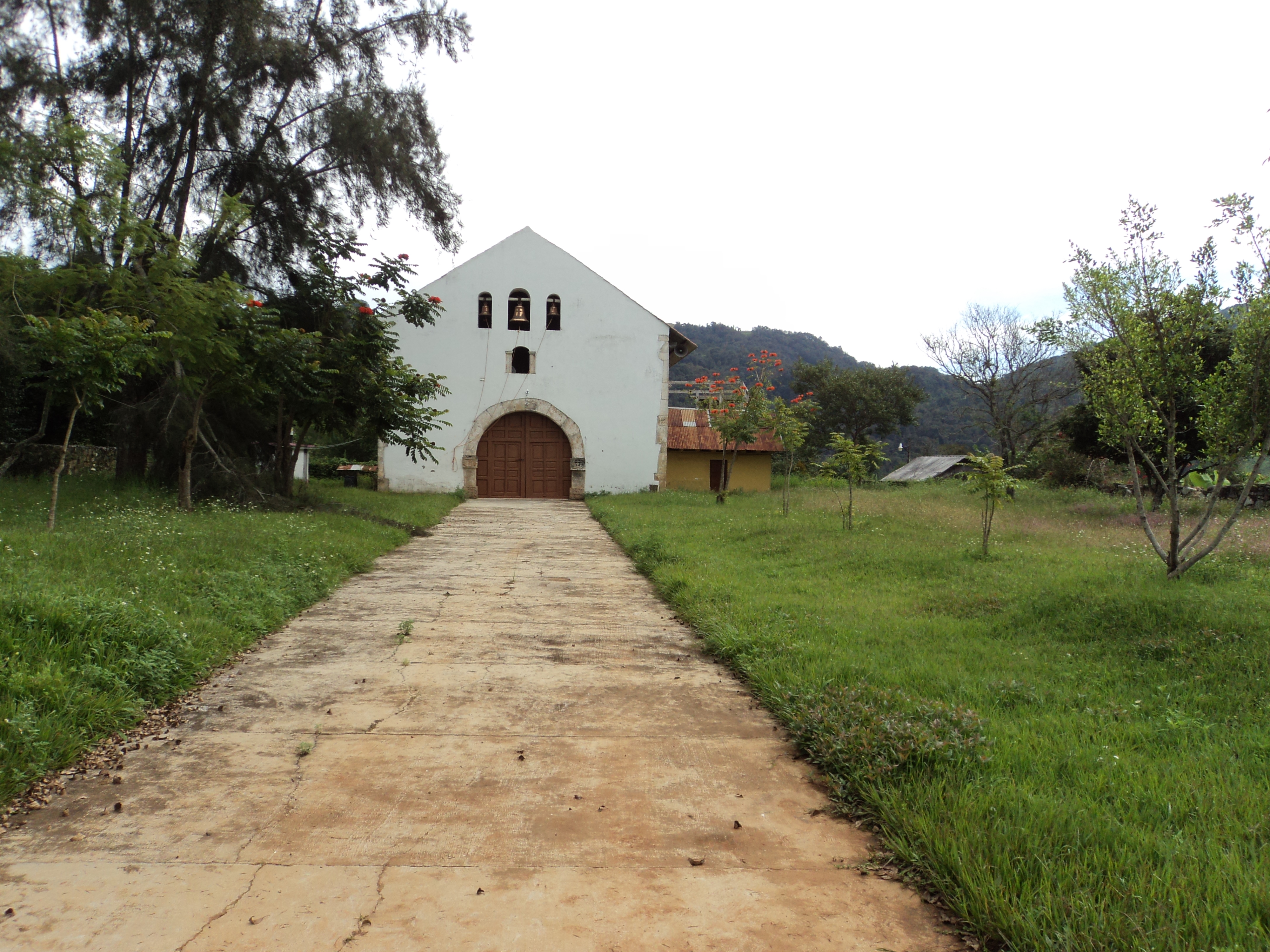 Capilla de San Martín de Tous